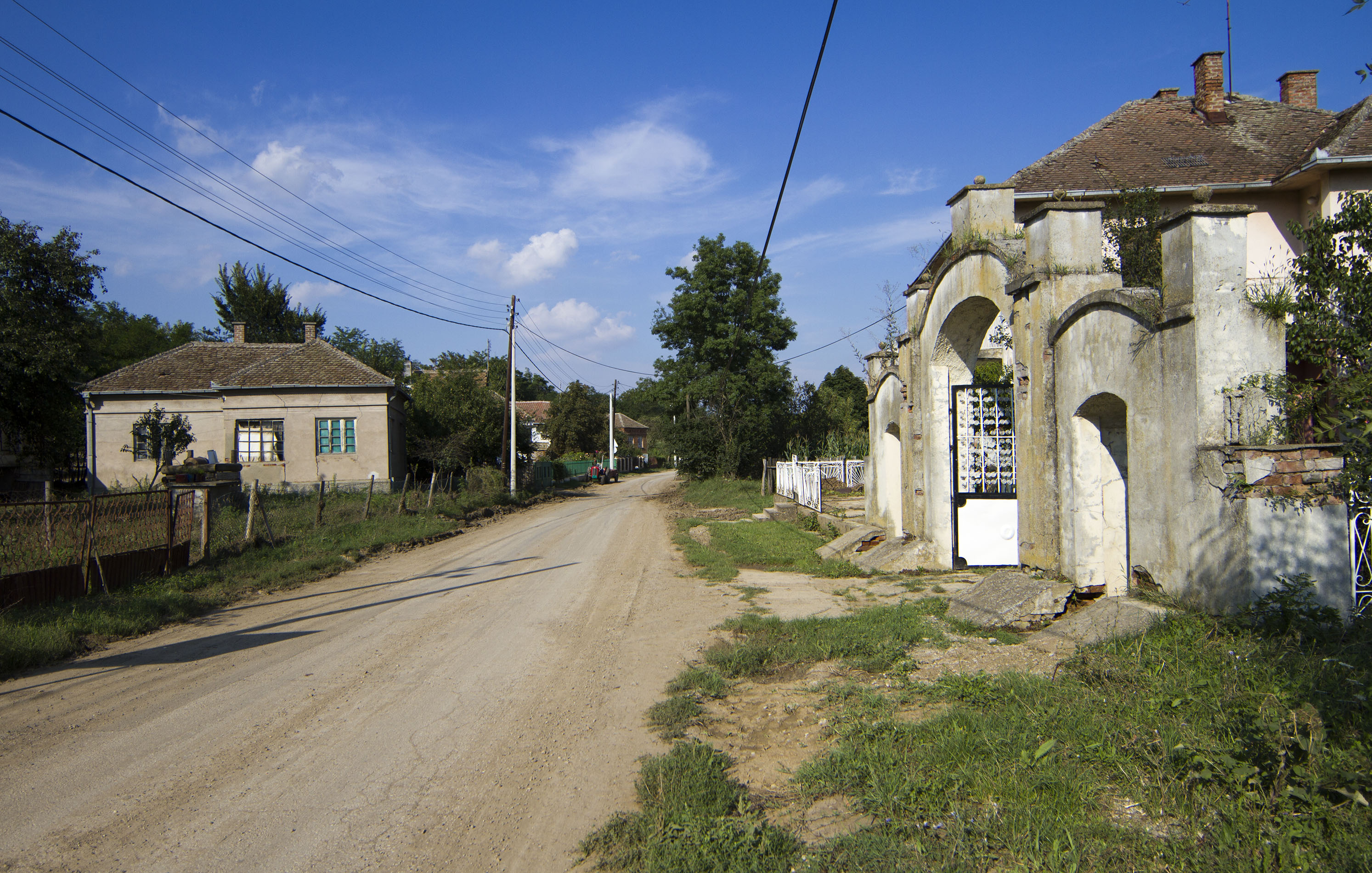 Живковац